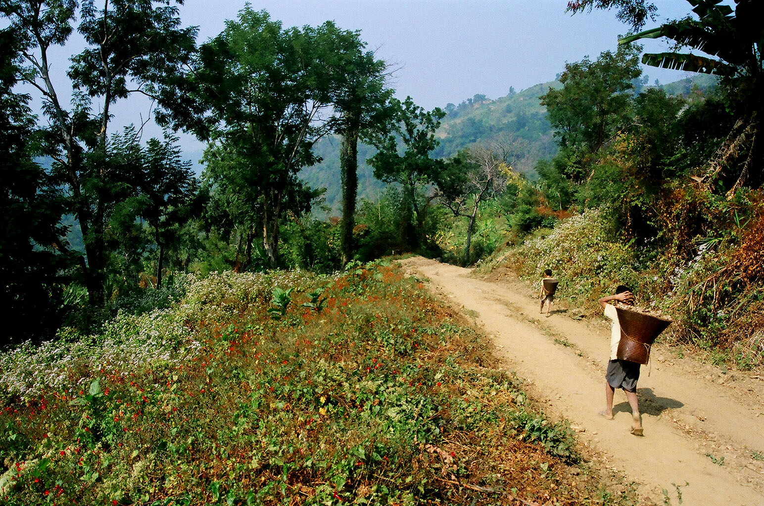 Road to Keokradong in Bandarban, Bangladesh